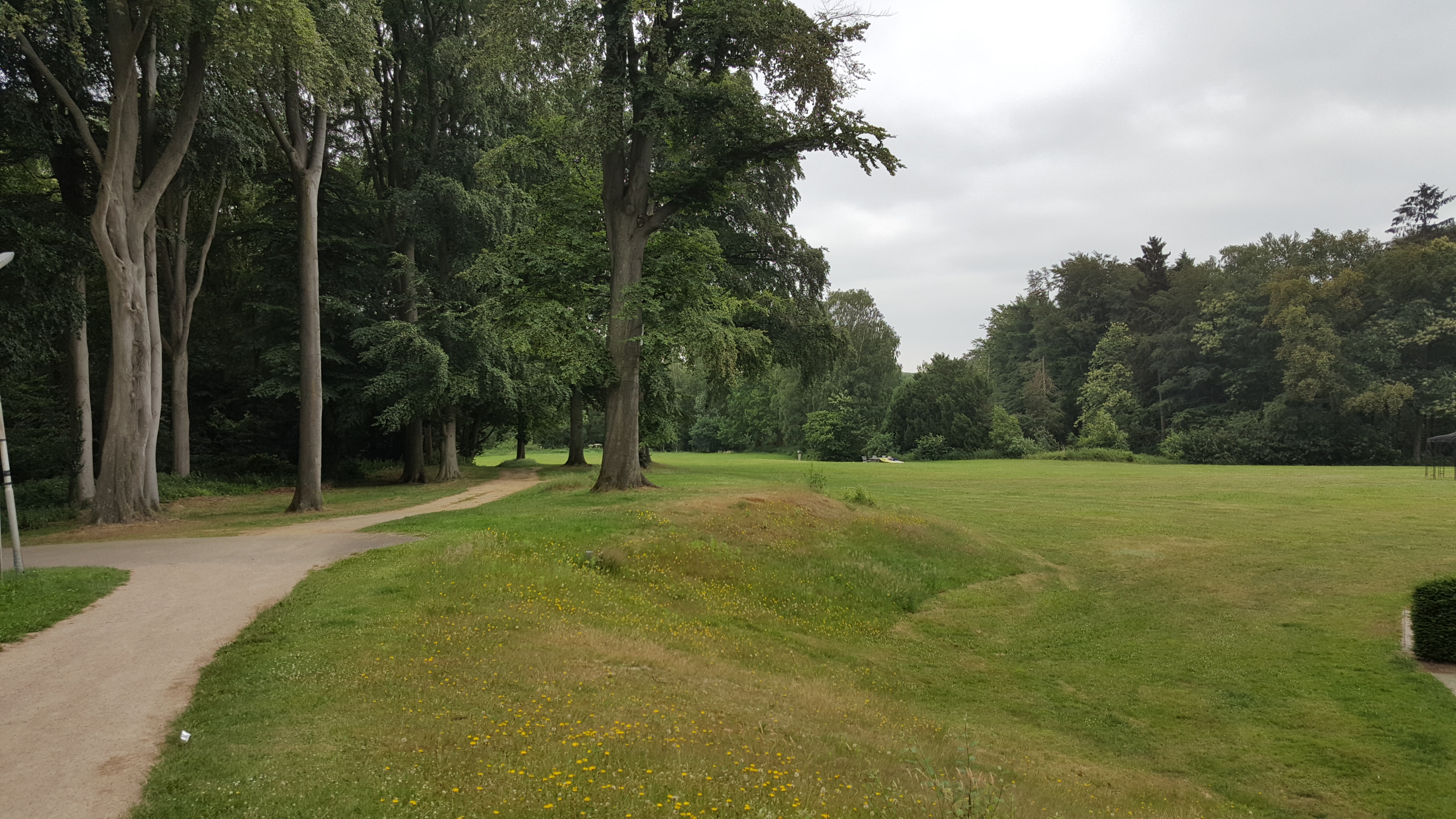 Archeologisch Rijksmonument nummer 45420, terrein Holdeurn, Oude Kleefsebaan Groesbeek